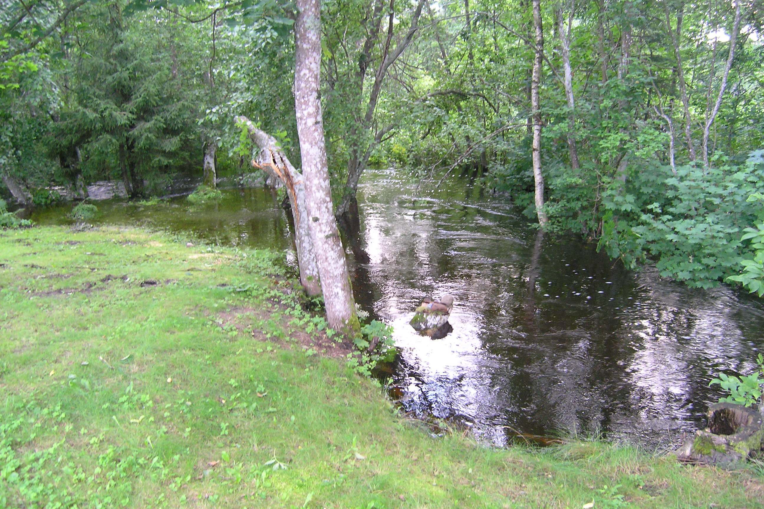 2004 suvise äikesetormi järel tekkinud suurvesi koos tormi käes murdunud puuga.